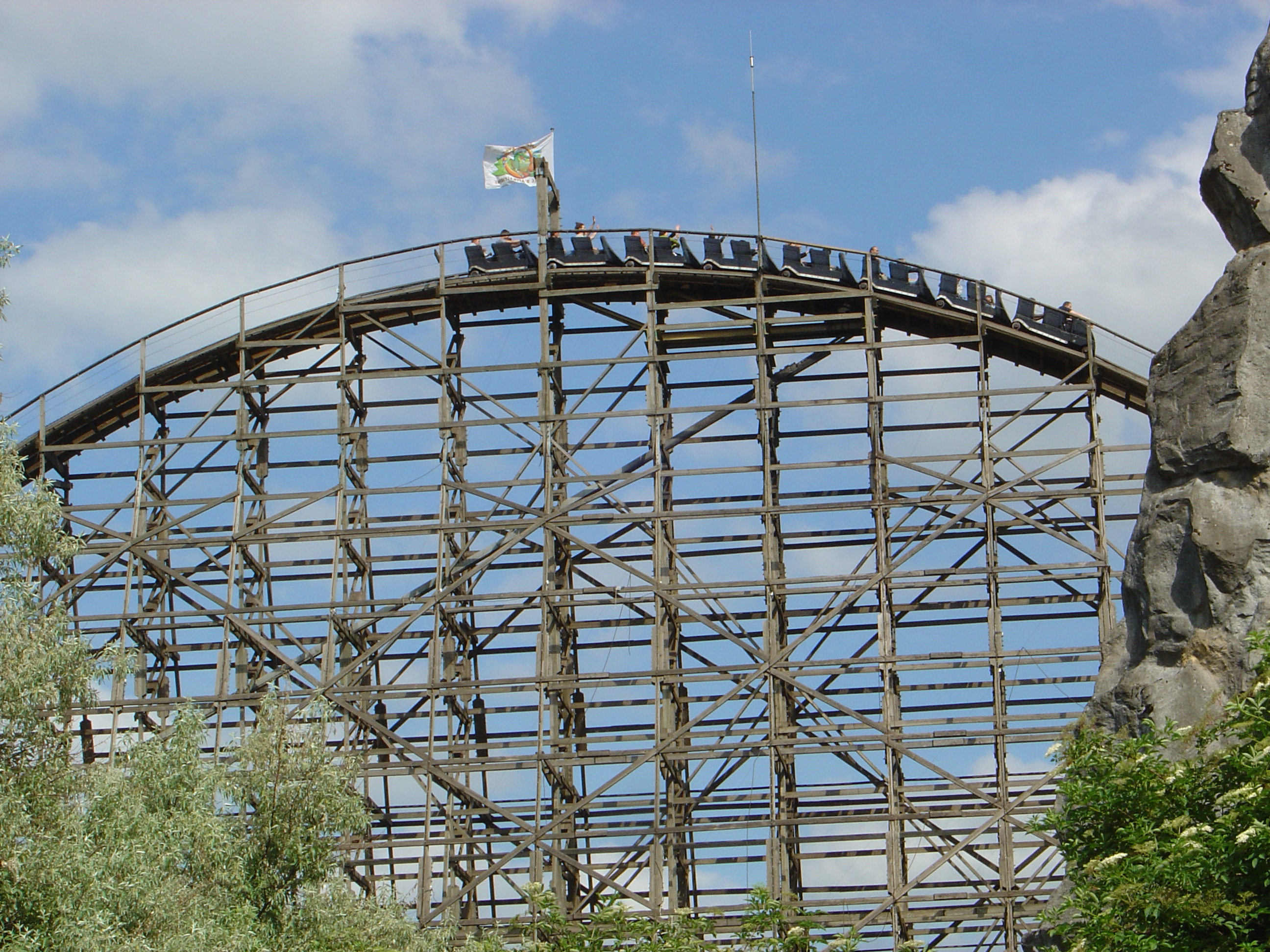 Anaconda at Walygator park